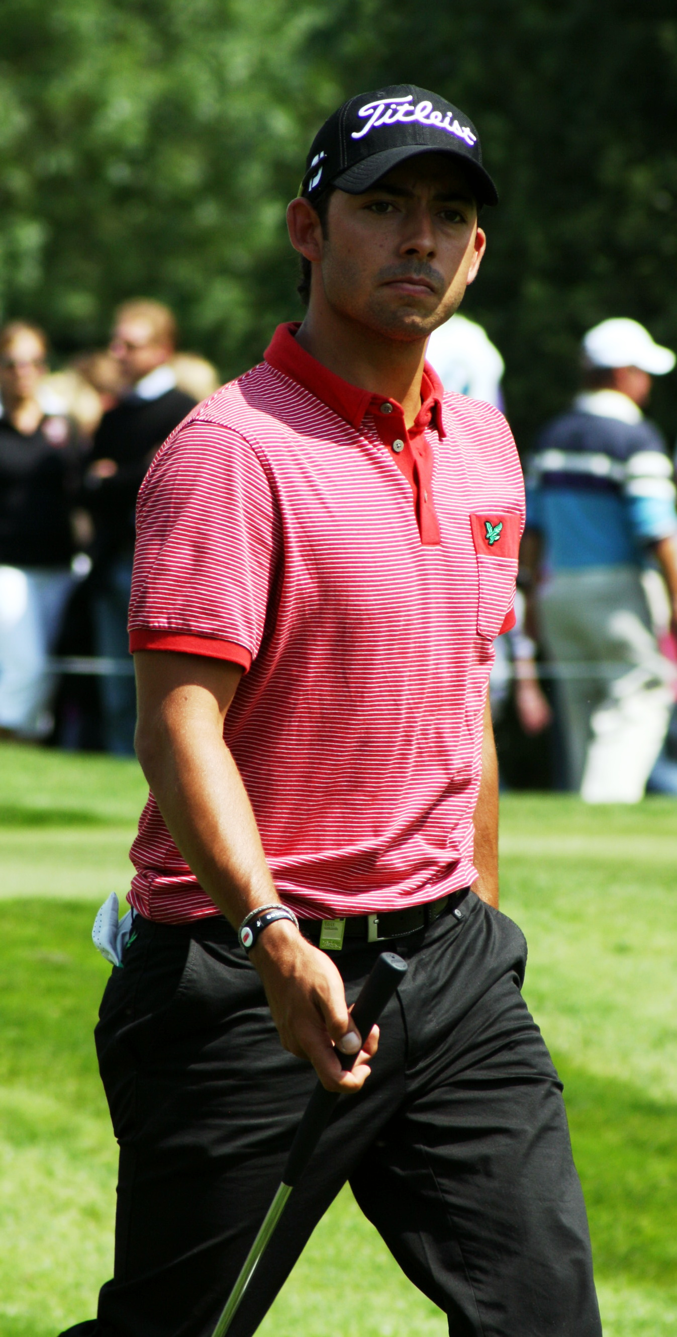 23 BMW International Open bei Muenchen Golfer LARRAZABAL Pablo